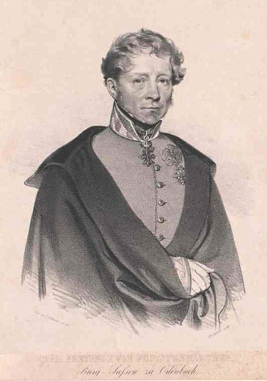 Freiherr Friedrich Karl von Fürstenwärther (1769-1856), österreichischer Feldmarschall-Leutnant, pfälzischer Herkunft (aus dem Haus Wittelsbach)